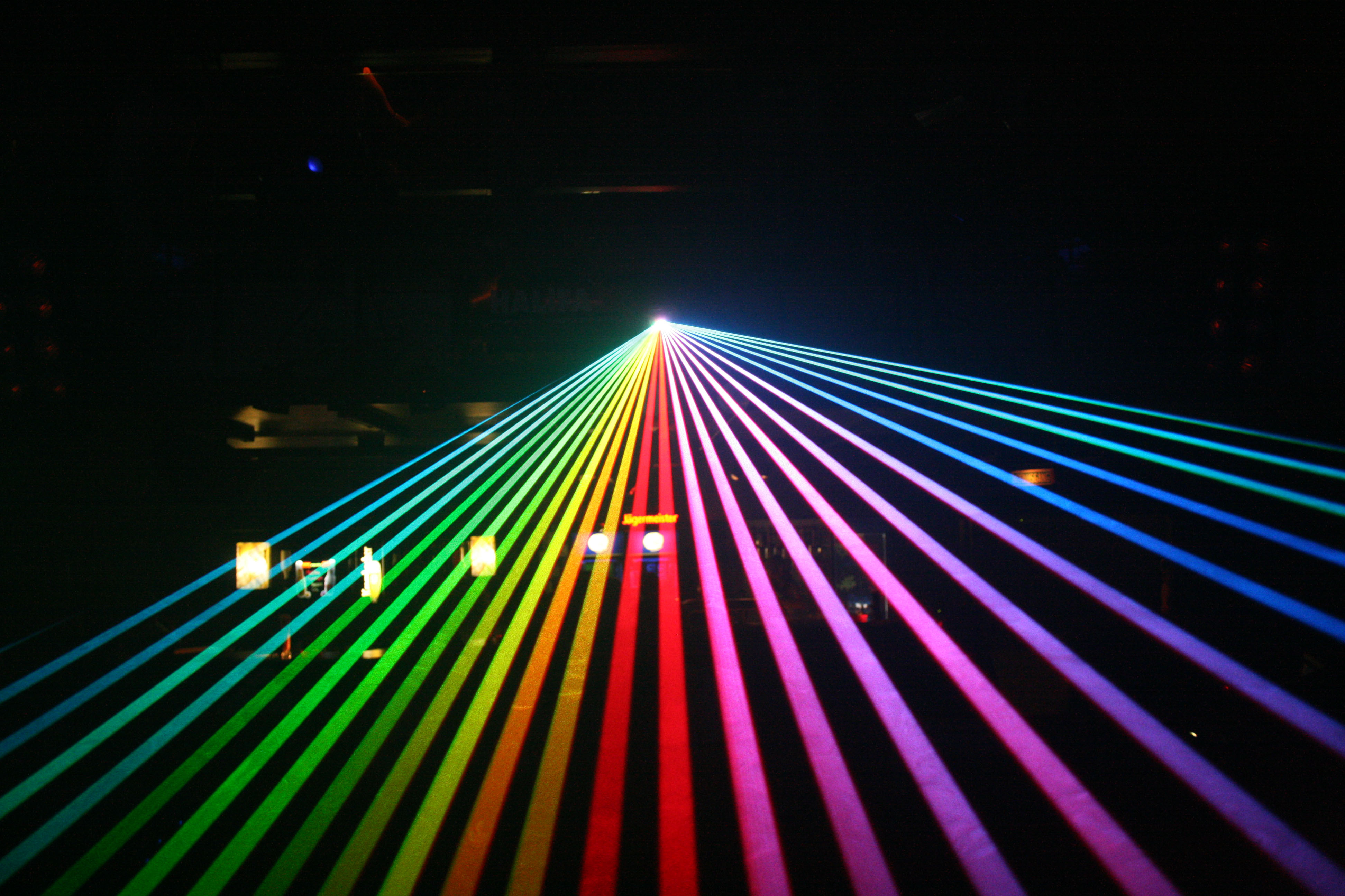 Lasershow Discothek Halifax, Himmelkron, Bayern